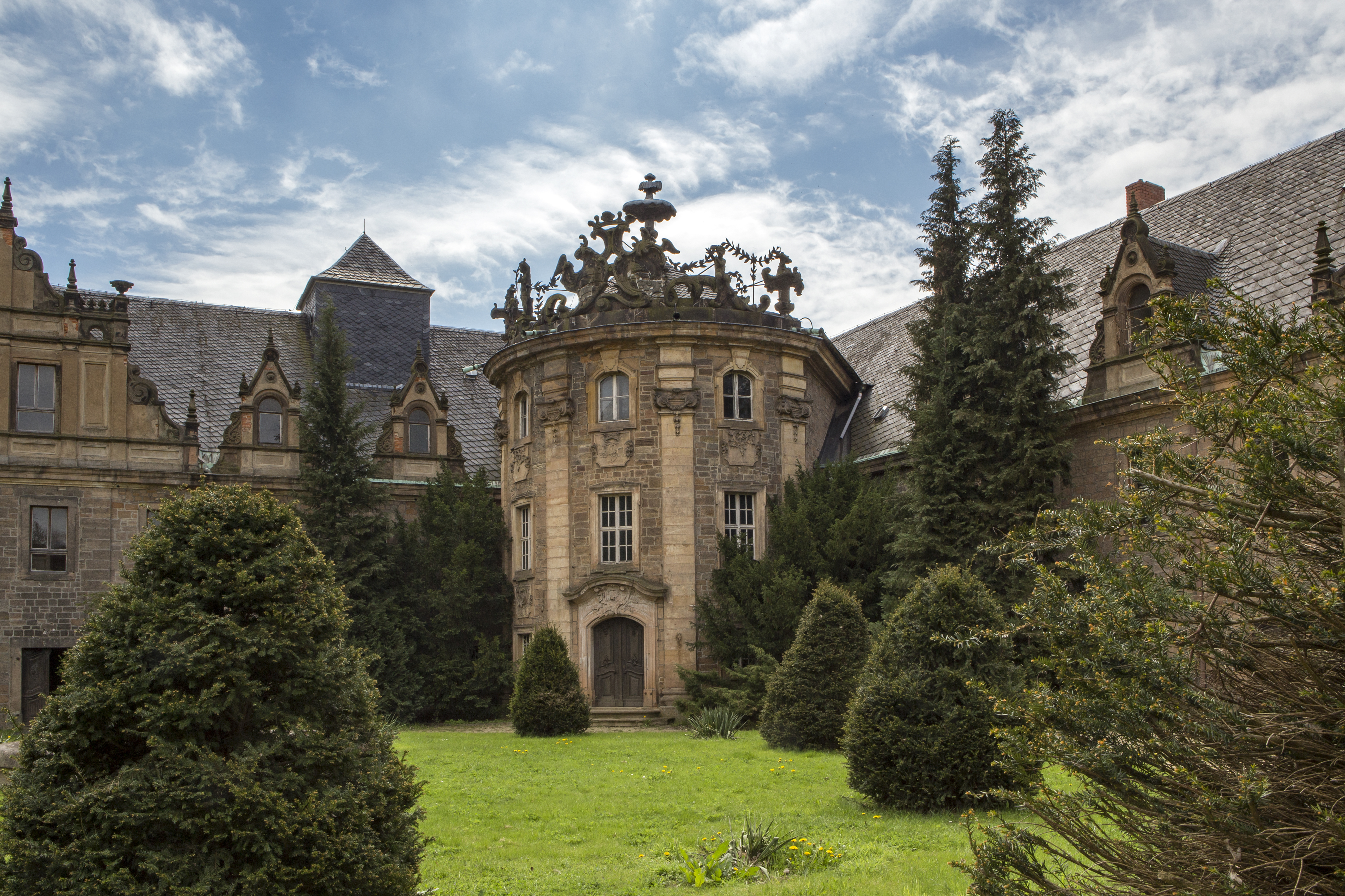 Sobald man das Eingangstor durchschreitet bietet sich dieser Anblick. Das Schloss ist in einem 90°Winkel gebaut worden. Mittig ist der Rundbau zu sehen, in dem sich das Treppenhaus befindet.